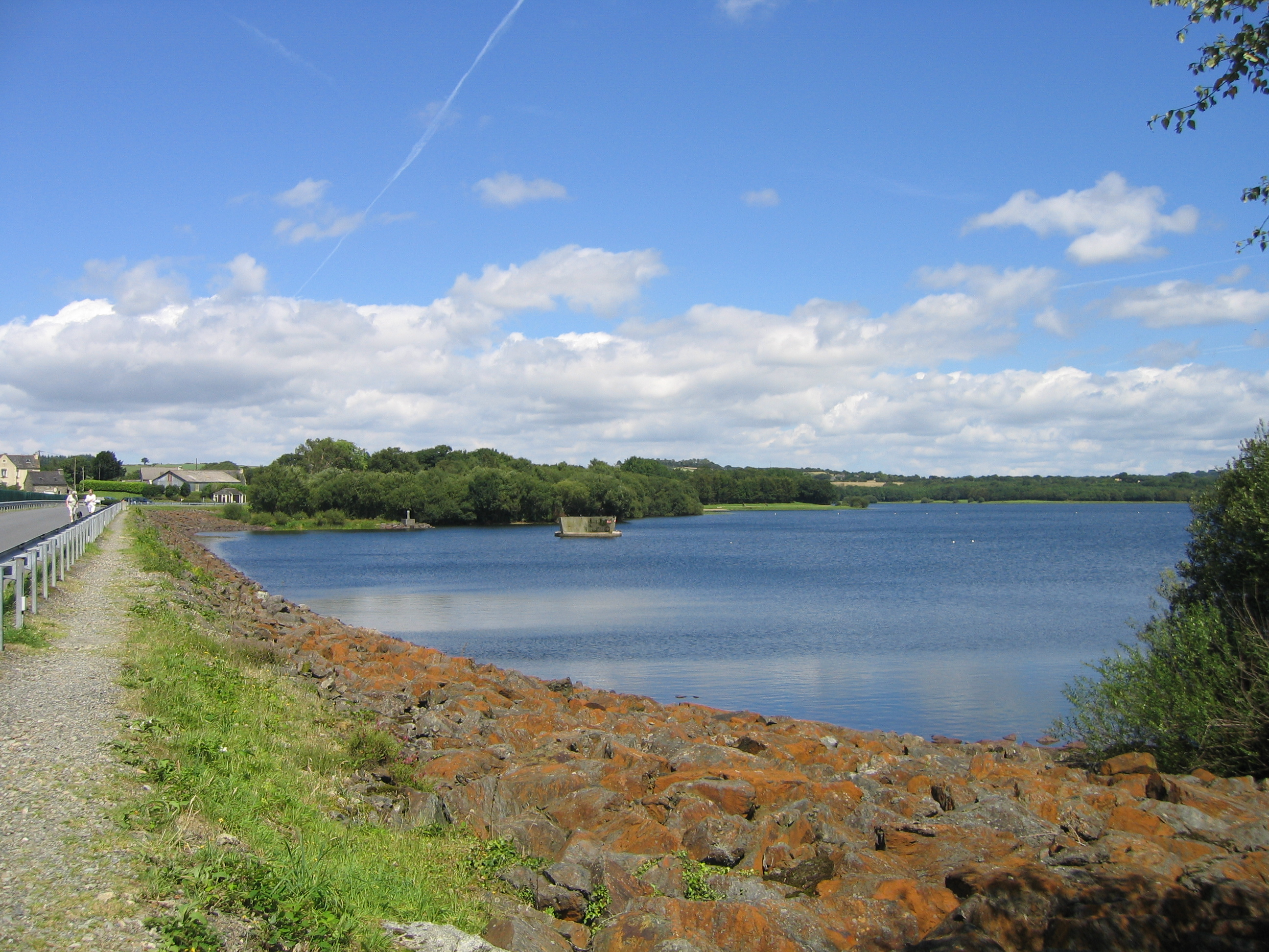 Le lac de Drennec vu de la route passant sur la digue, à droite, le trop plein haut de 16 mètres